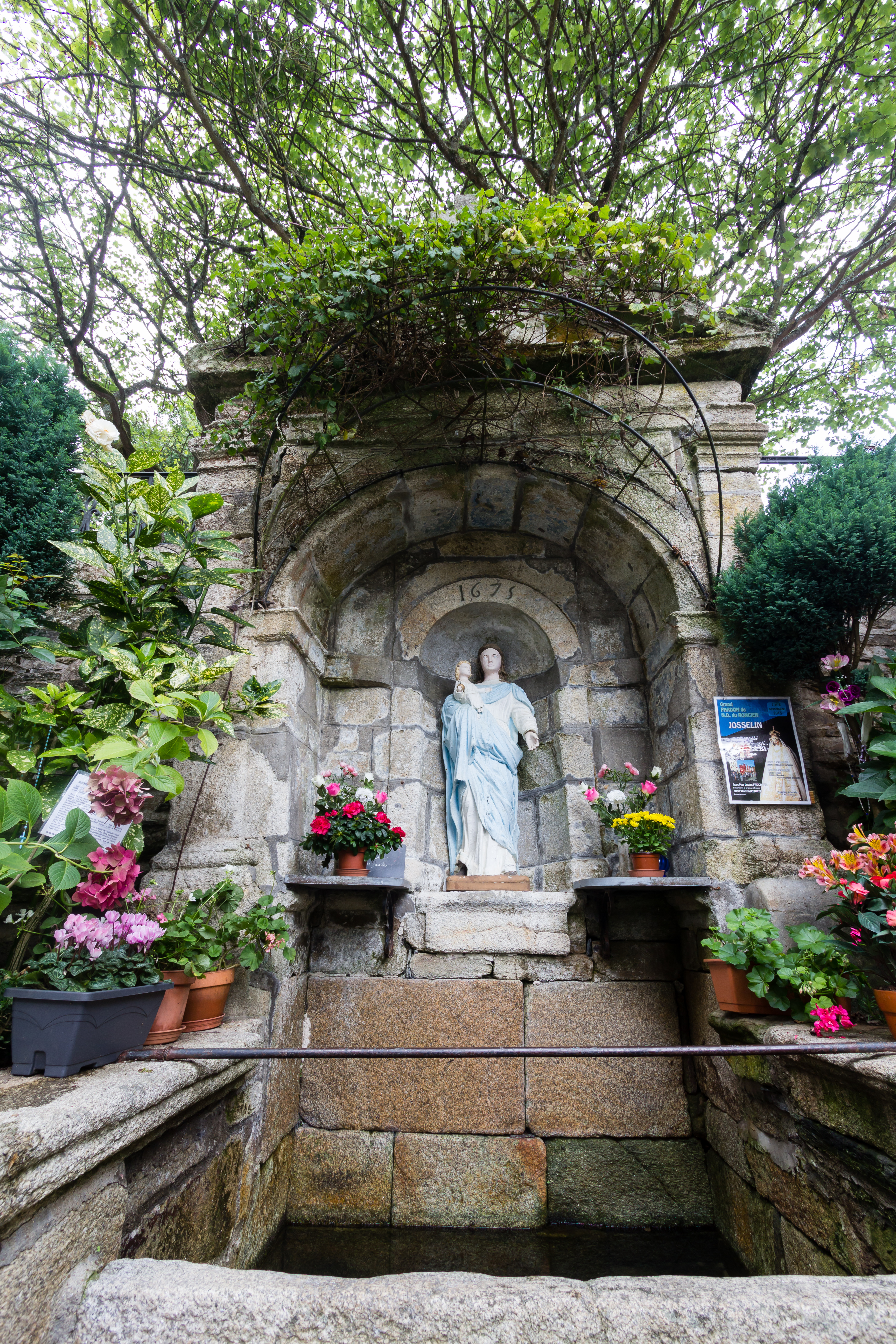 Fontaine Notre-Dame-du-Roncier de Josselin (France).